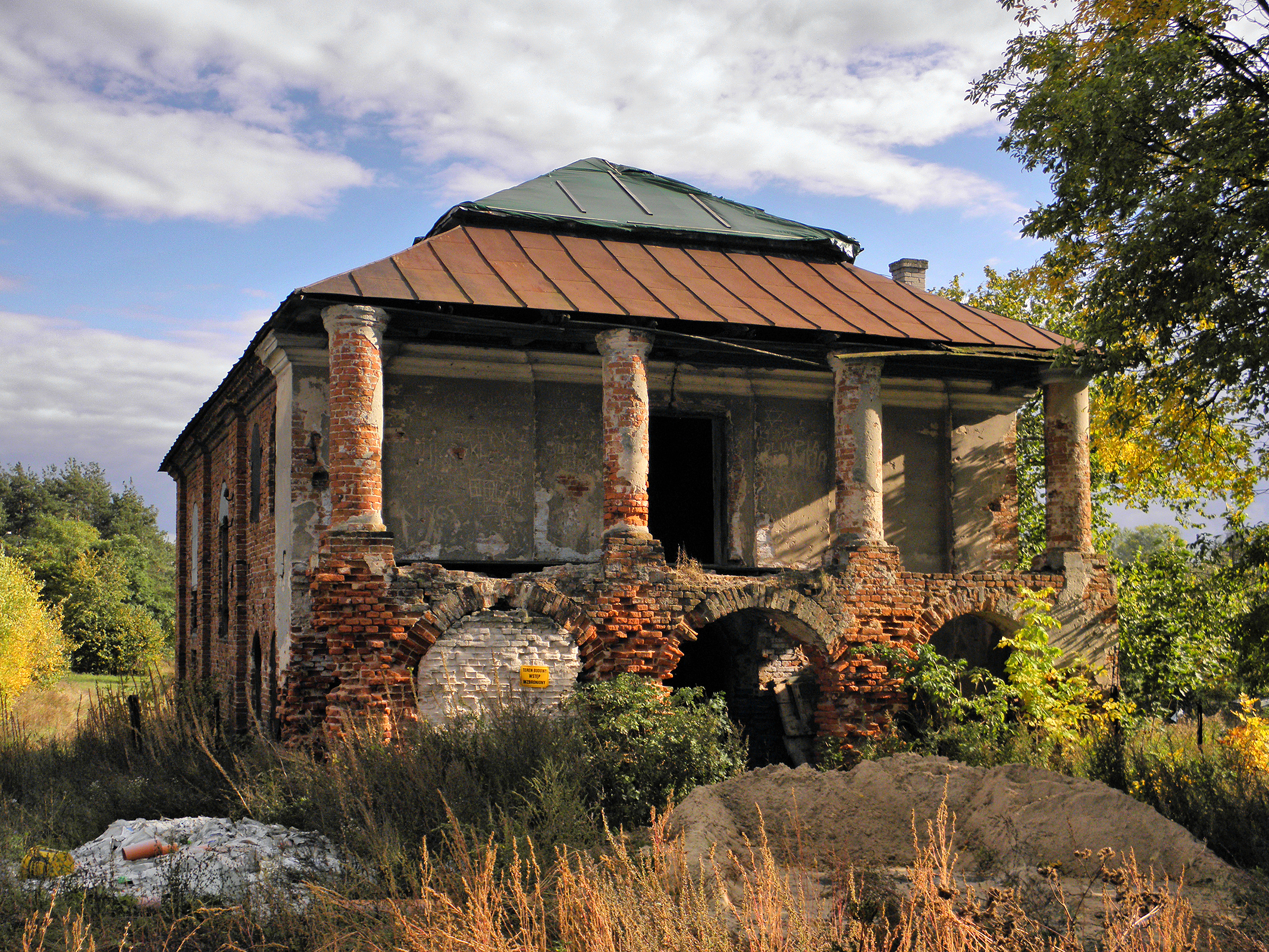 Budynek synagogi w Ciepielowie.